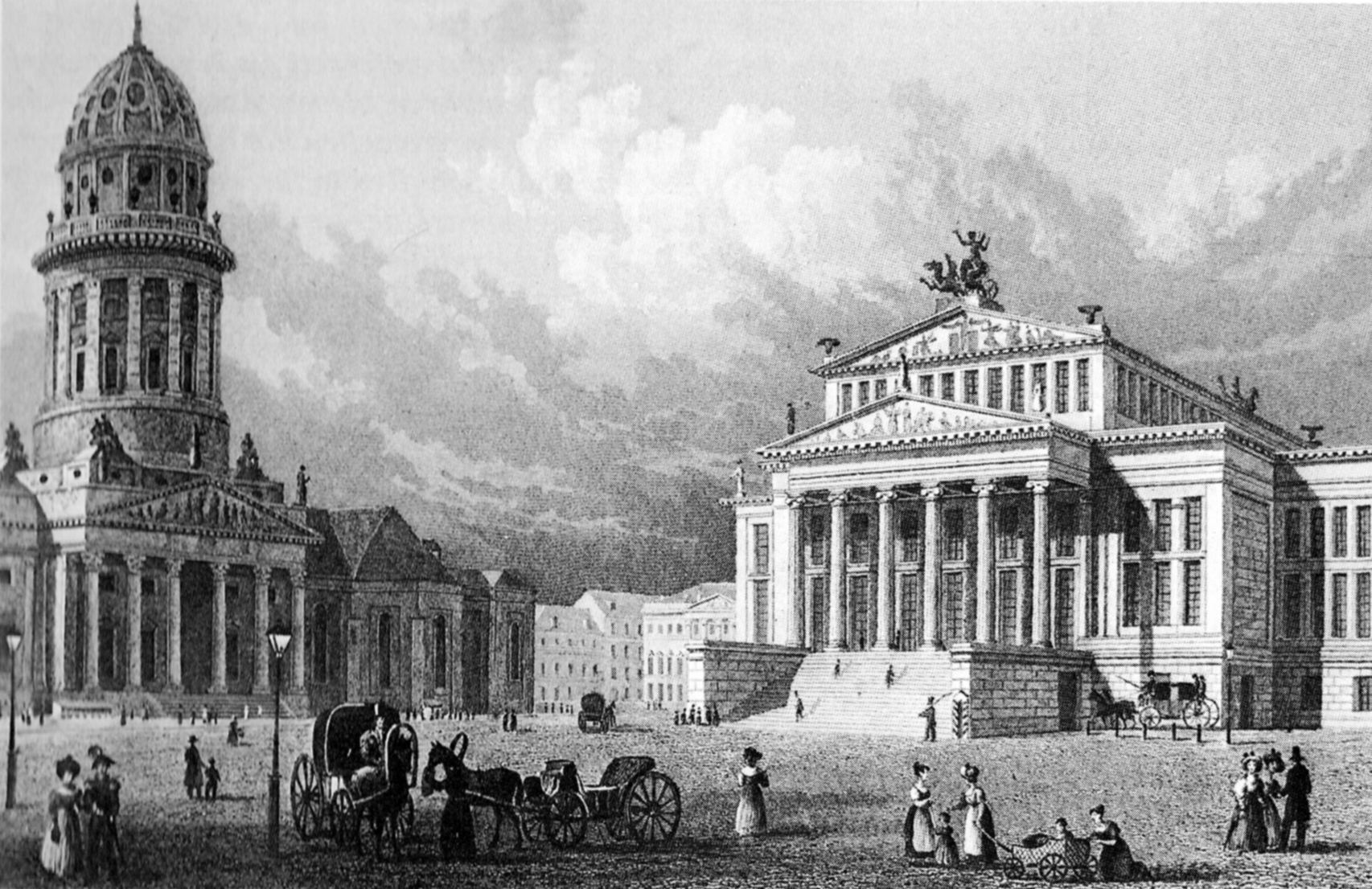 Buildings at the Gendarmenmakt-square in Berlin, steel engraving